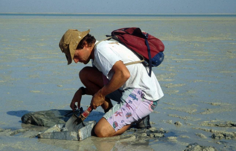 Dr. Michael Apel, subject: Probenentnahme